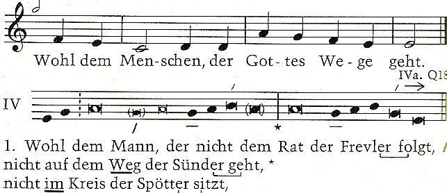 Psalm 1,1, Gotteslob (1975) Nr. 708, Antiphon und Vers